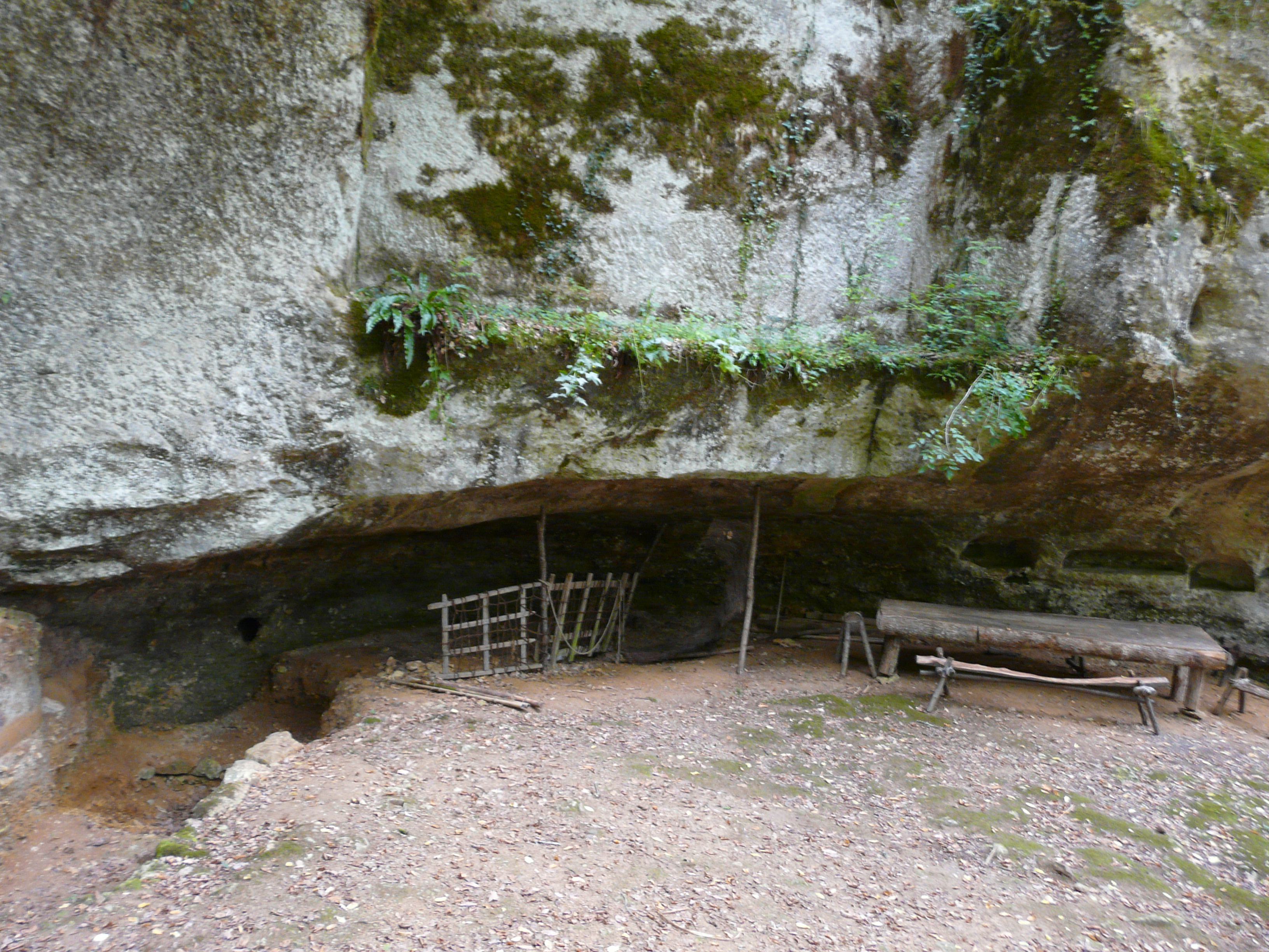 L'abri de la Souquette, Castel Merle, Sergeac, Dordogne, France.